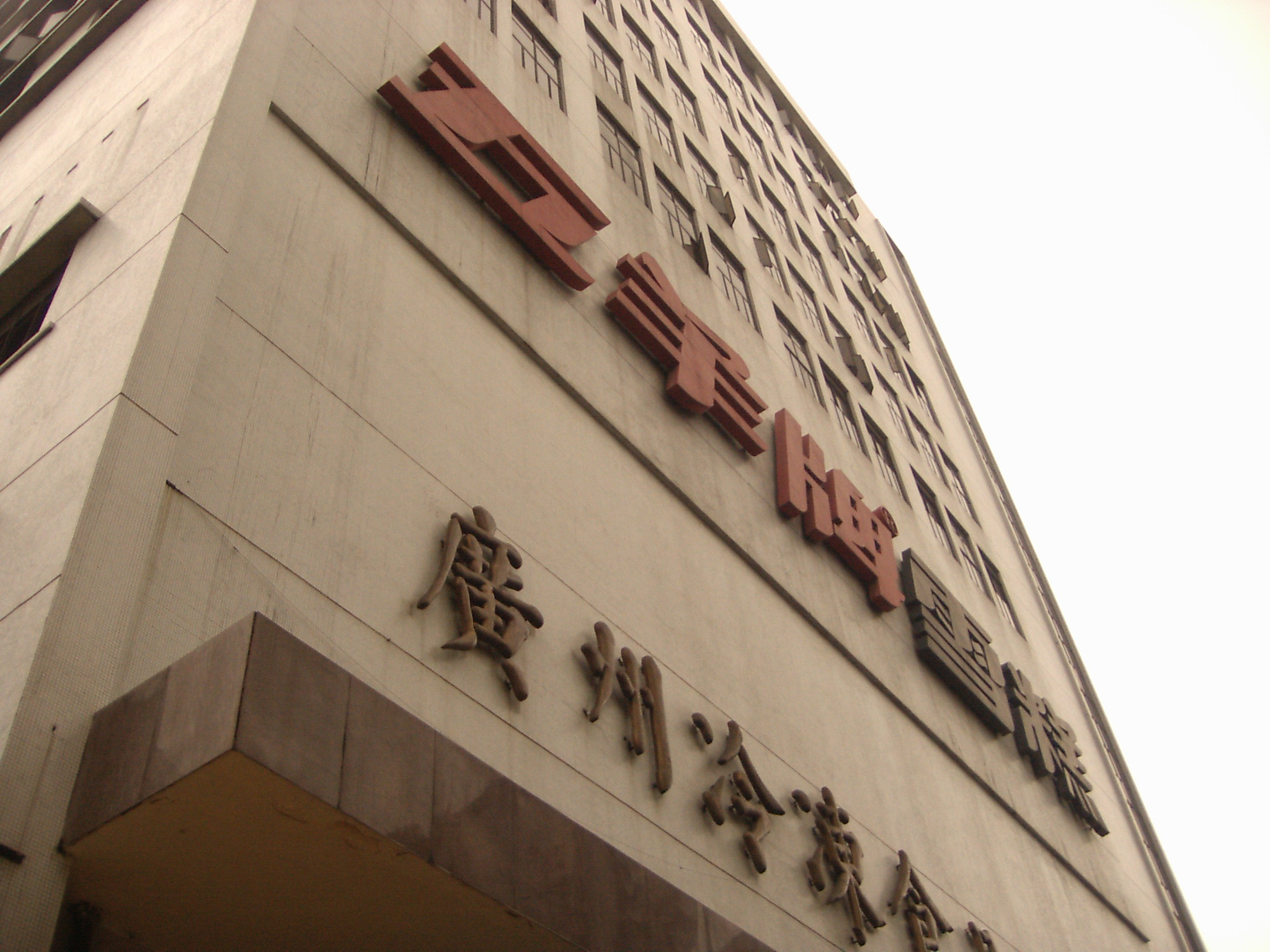 中文（中国大陆）: 原五羊牌雪糕厂房